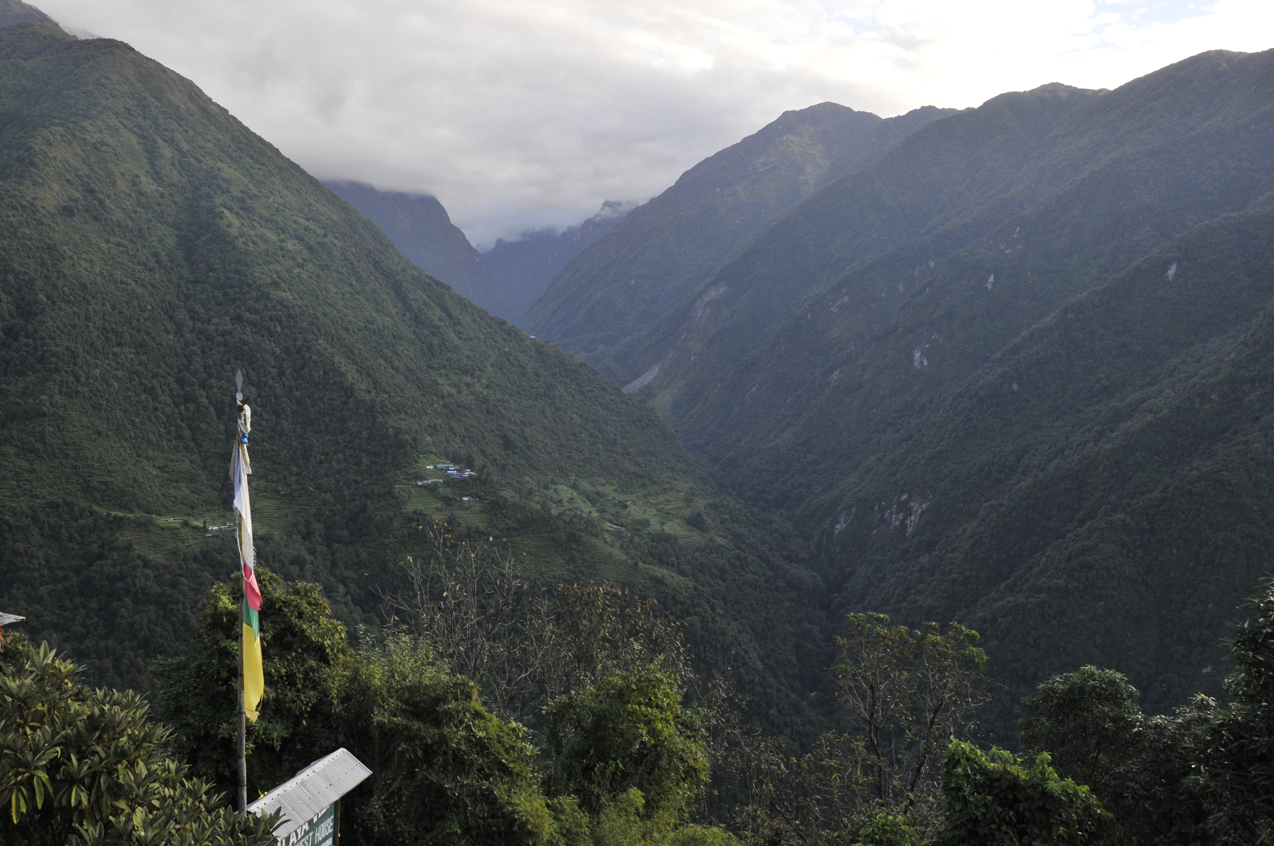 VISA DEL VALLE DEL MHODI DESDE CHOMRONG